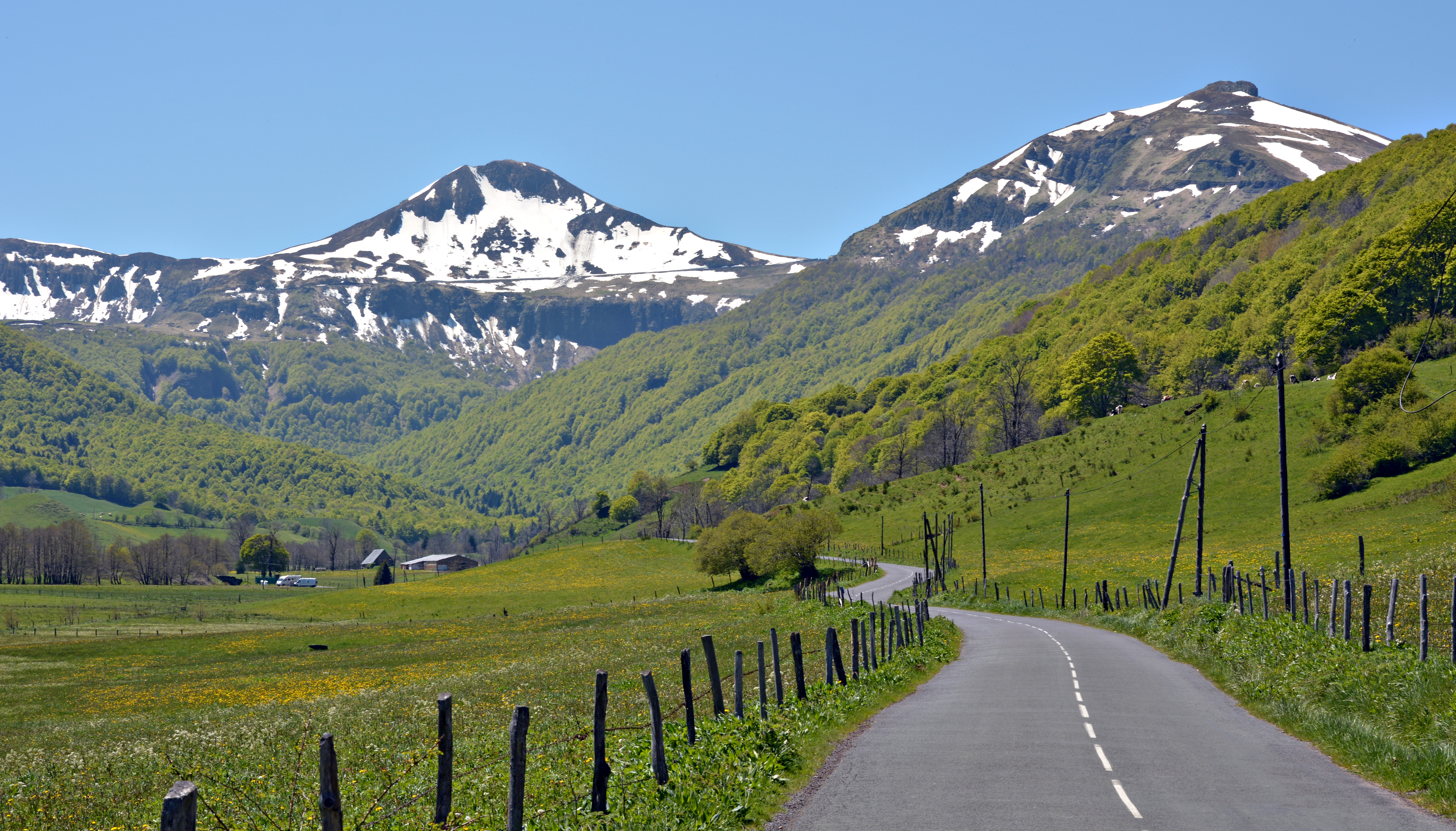 Fond de la vallée de Cheylade, Cantal, Auvergne, France